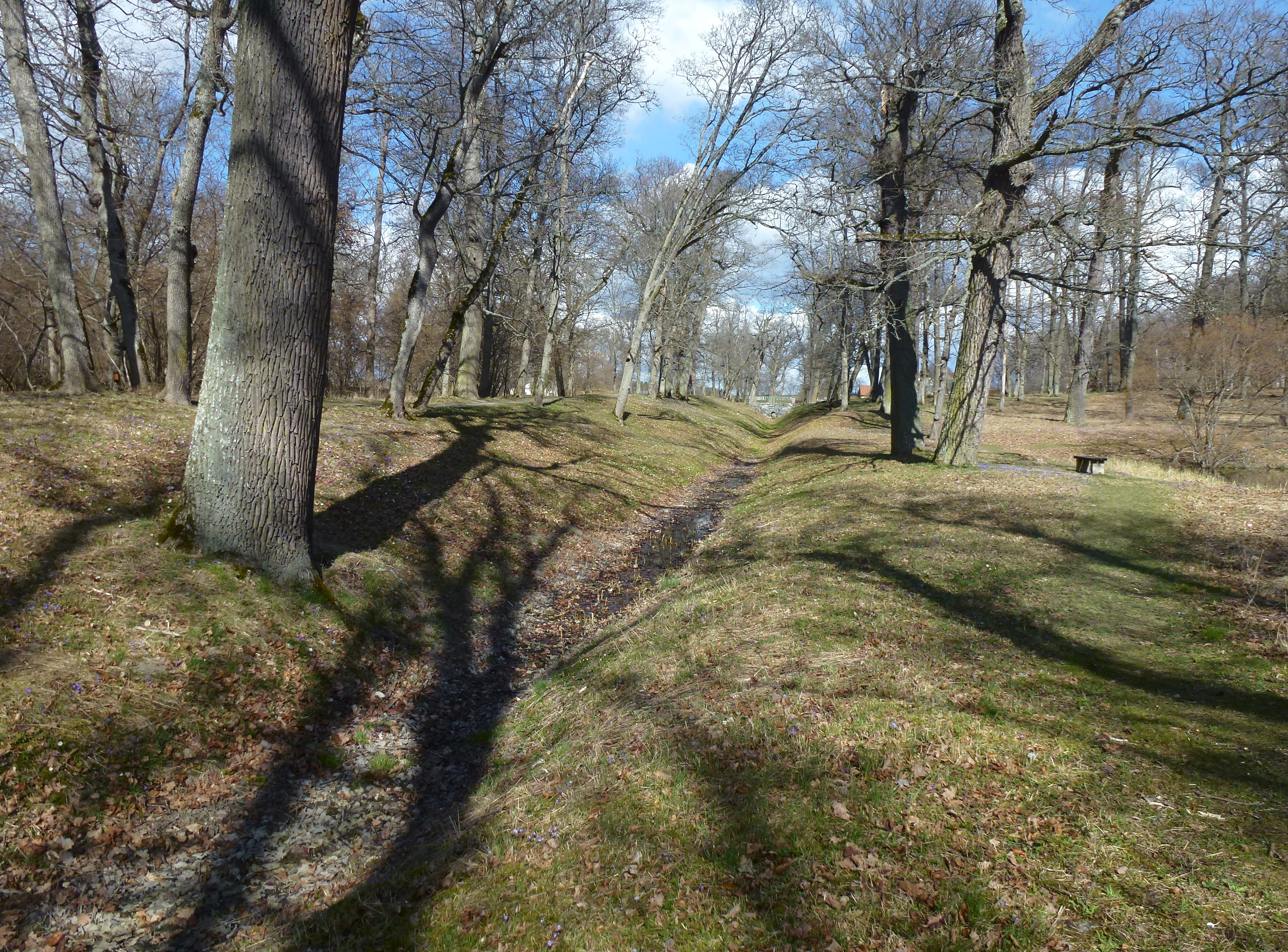 Svartsjö slott park, tidigare vattenfylld vallgrav